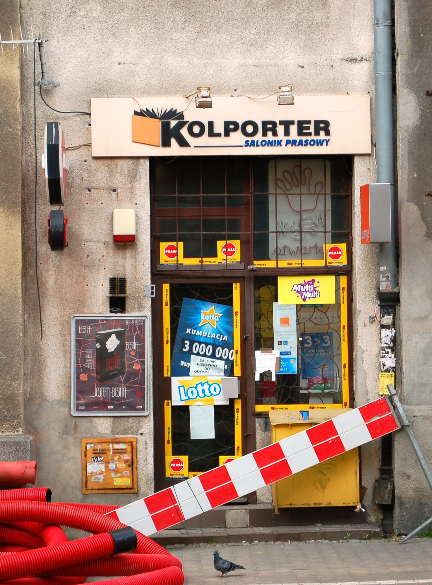 Kolporter Kiosk, Ulica Dobra, Warschau